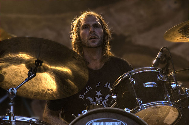 Entombed´s drummer Olleh Dahlstedt, playing live in 2008.